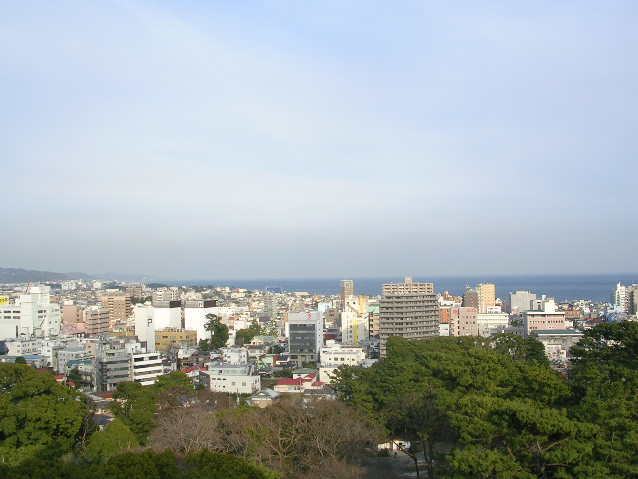 Odawara, Kanagawa, Japon